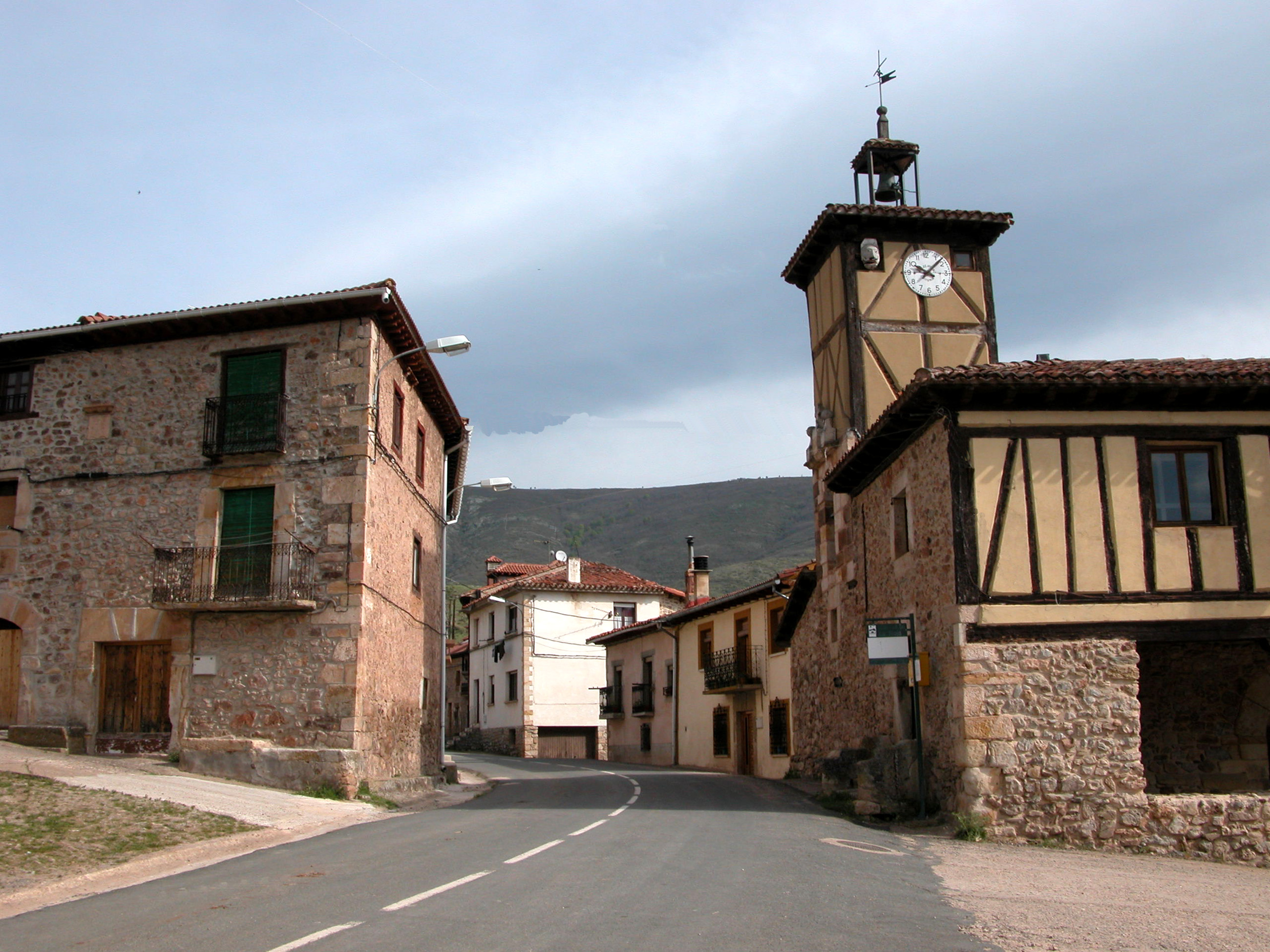 Canales de la Sierra (La Rioja - España)